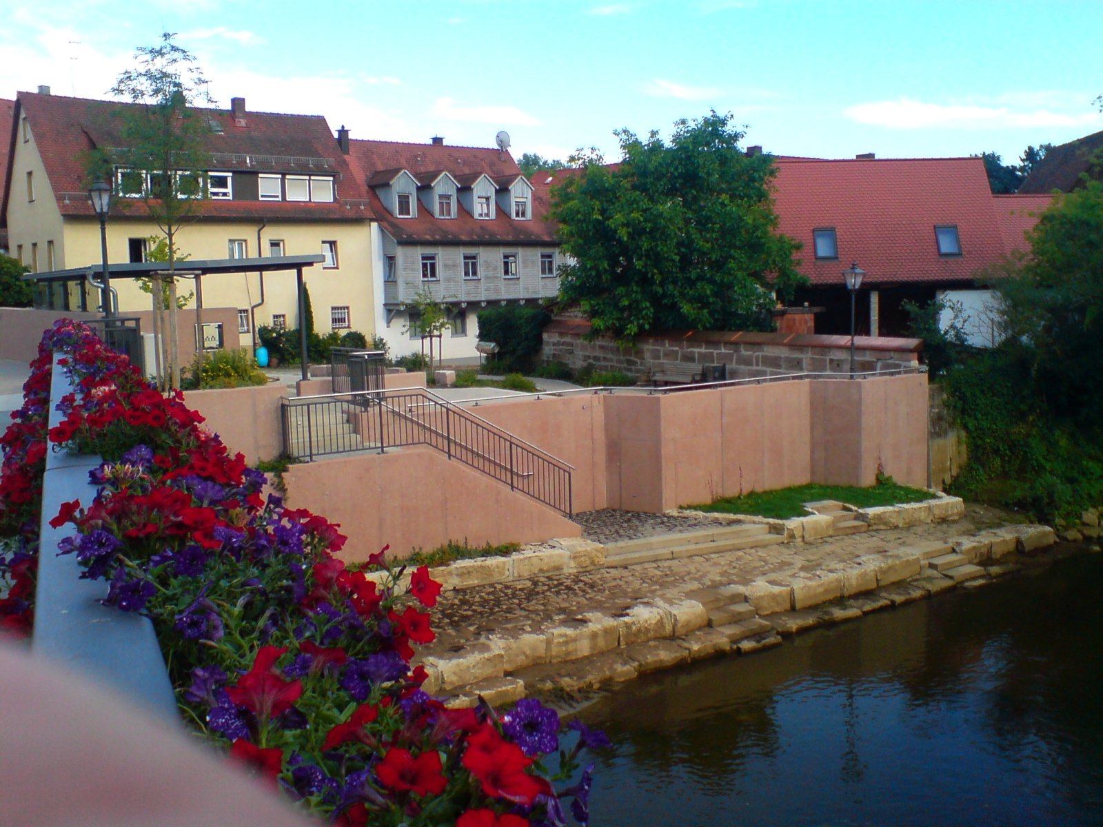 Badhausplatz Wendelstein von Norden